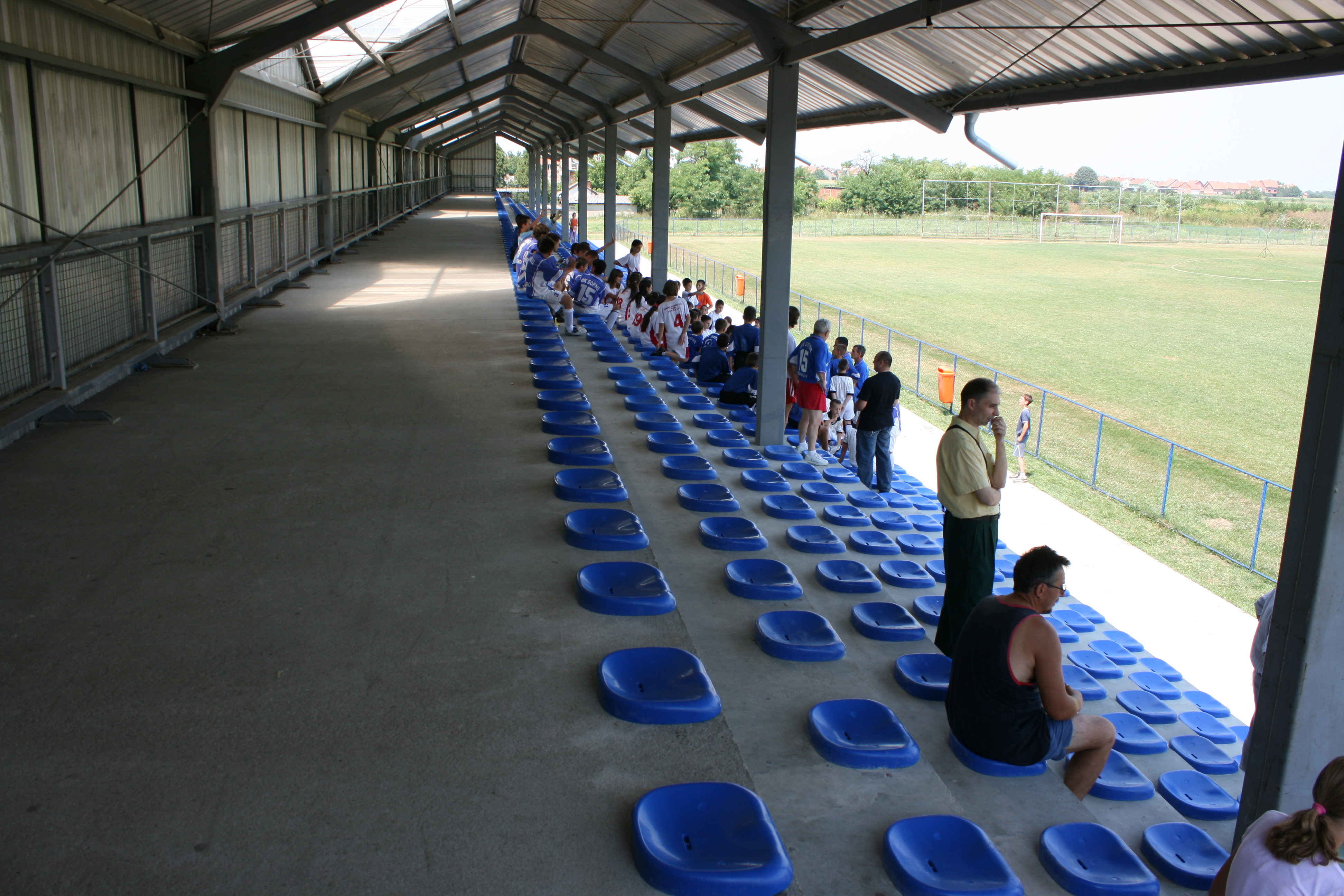 Стадион ФК Борац у Старчеву, Град Панчево, Србија.